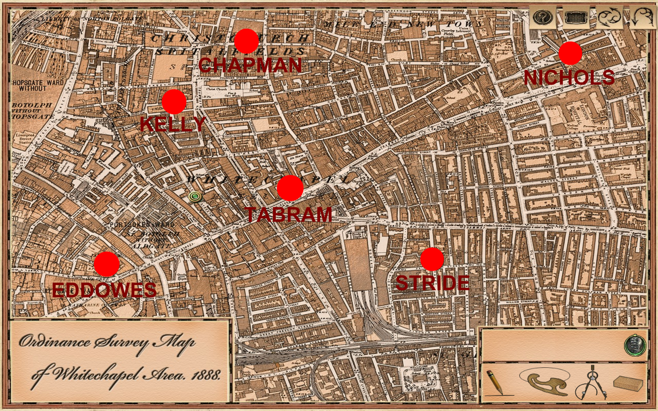 Capture d'écran du jeu Sherlock Holmes contre Jack l'Éventreur. Holmes utilise cette carte pour y placer les meurtres survenus au cours du jeu. Ici, la carte a été modifiée en y ajoutant des points rouges aux endroits où les meurtres ont été commis, ainsi que le nom des victimes. Le meurtre de Mary Jane Kelly a été placé sur la carte, alors que ce n'est pas le cas dans le jeu.